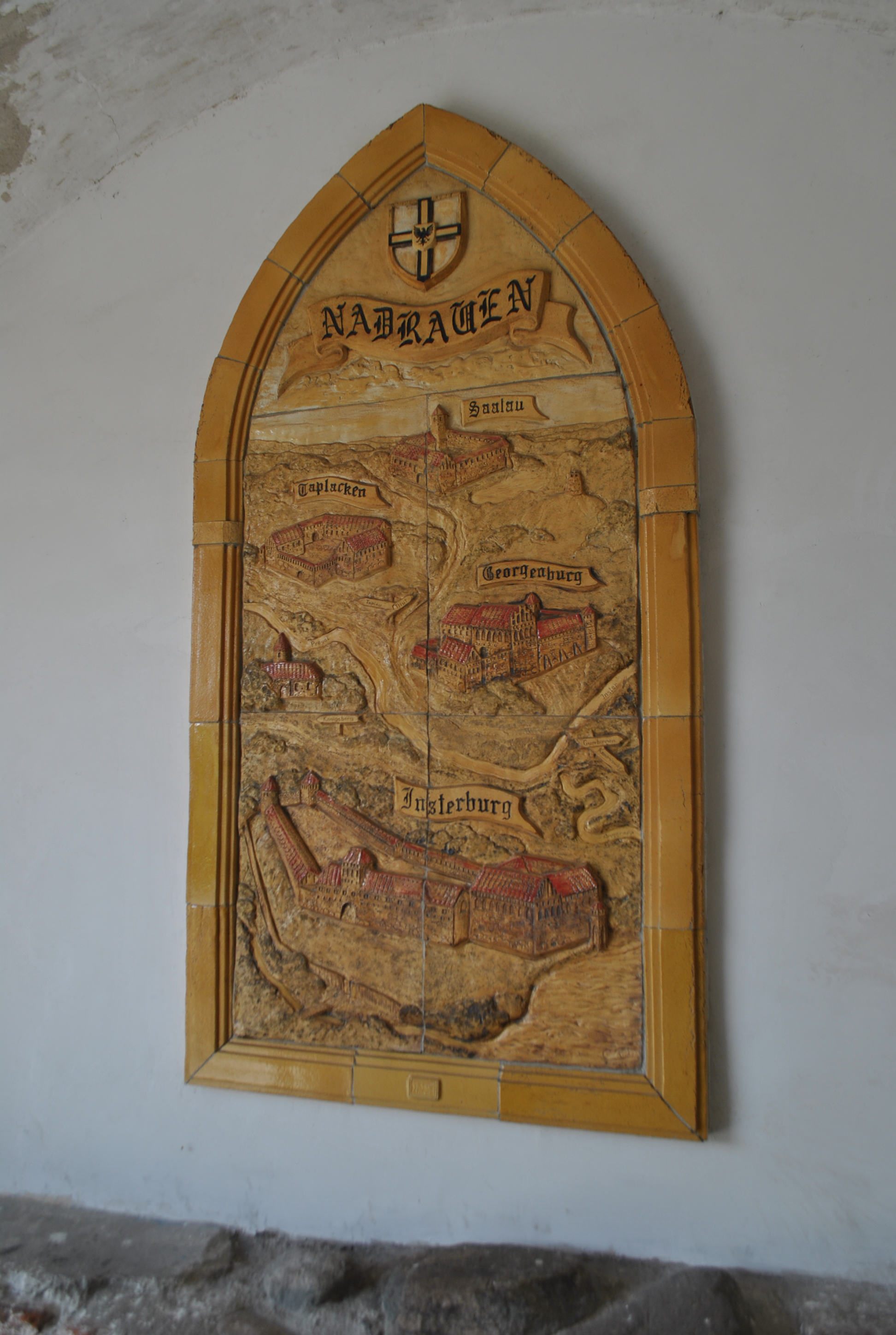 Архитектурный ансамбль Инстербург (замок) (Калиниградская область, Черняховск, город Черняховск)